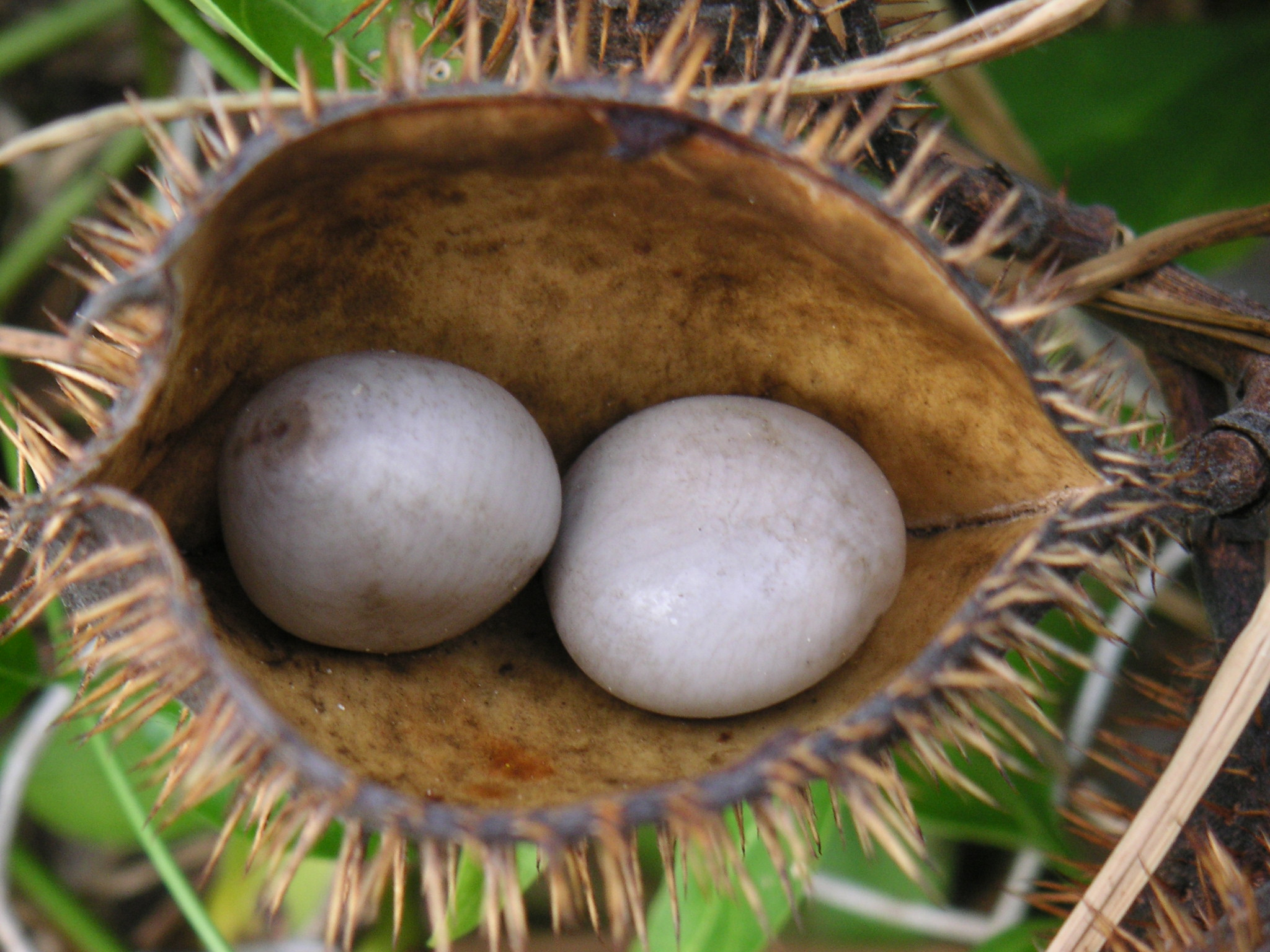 Caesalpinia bonduc, fruit